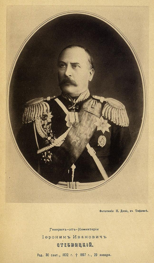 генерал-лейтенант Стебницкий Иероним Иванович в парадной форме